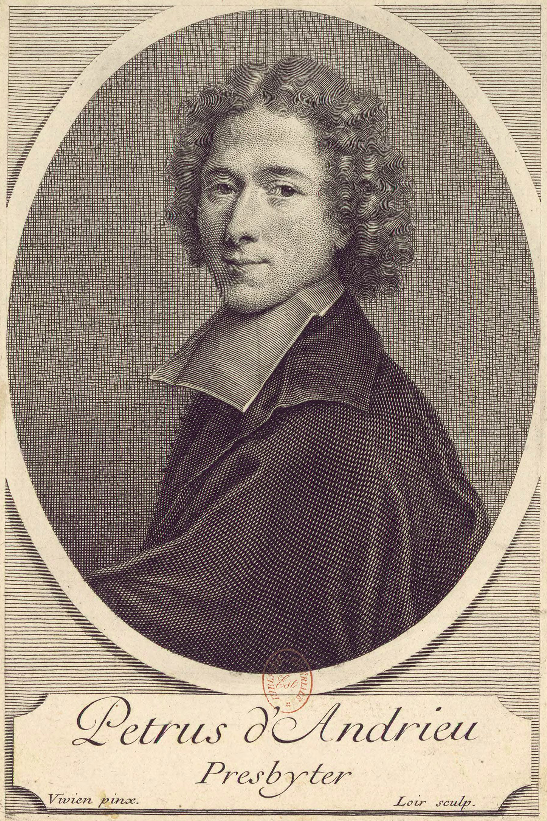 Portrait of Pierre d’Andrieu (1664-1733)